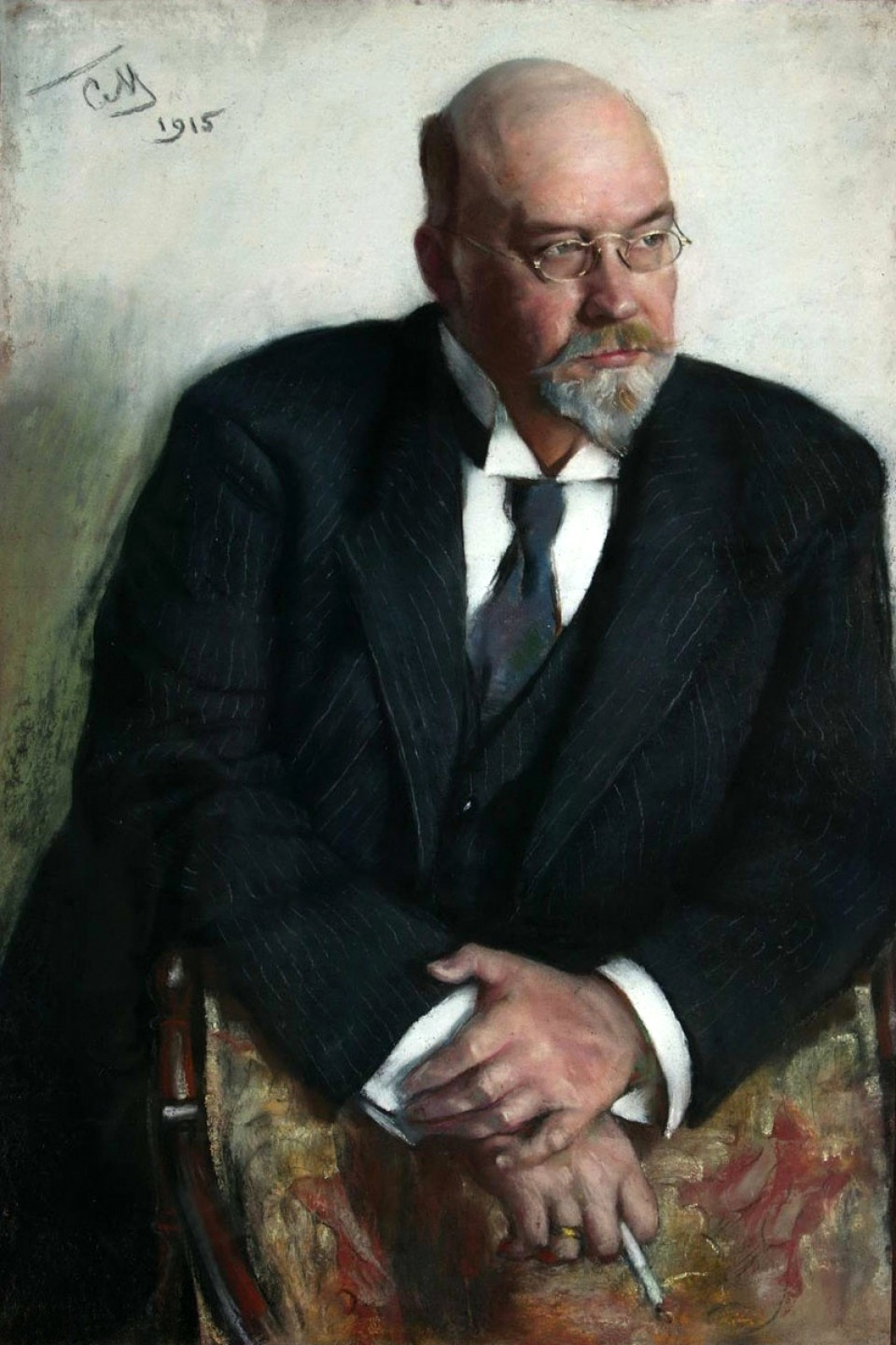 Портрет И.С. Остроухова. 1915 г. Государственная Третьяковская галерея (Остроухов Илья Семенович (1858-1929), русский живописец.